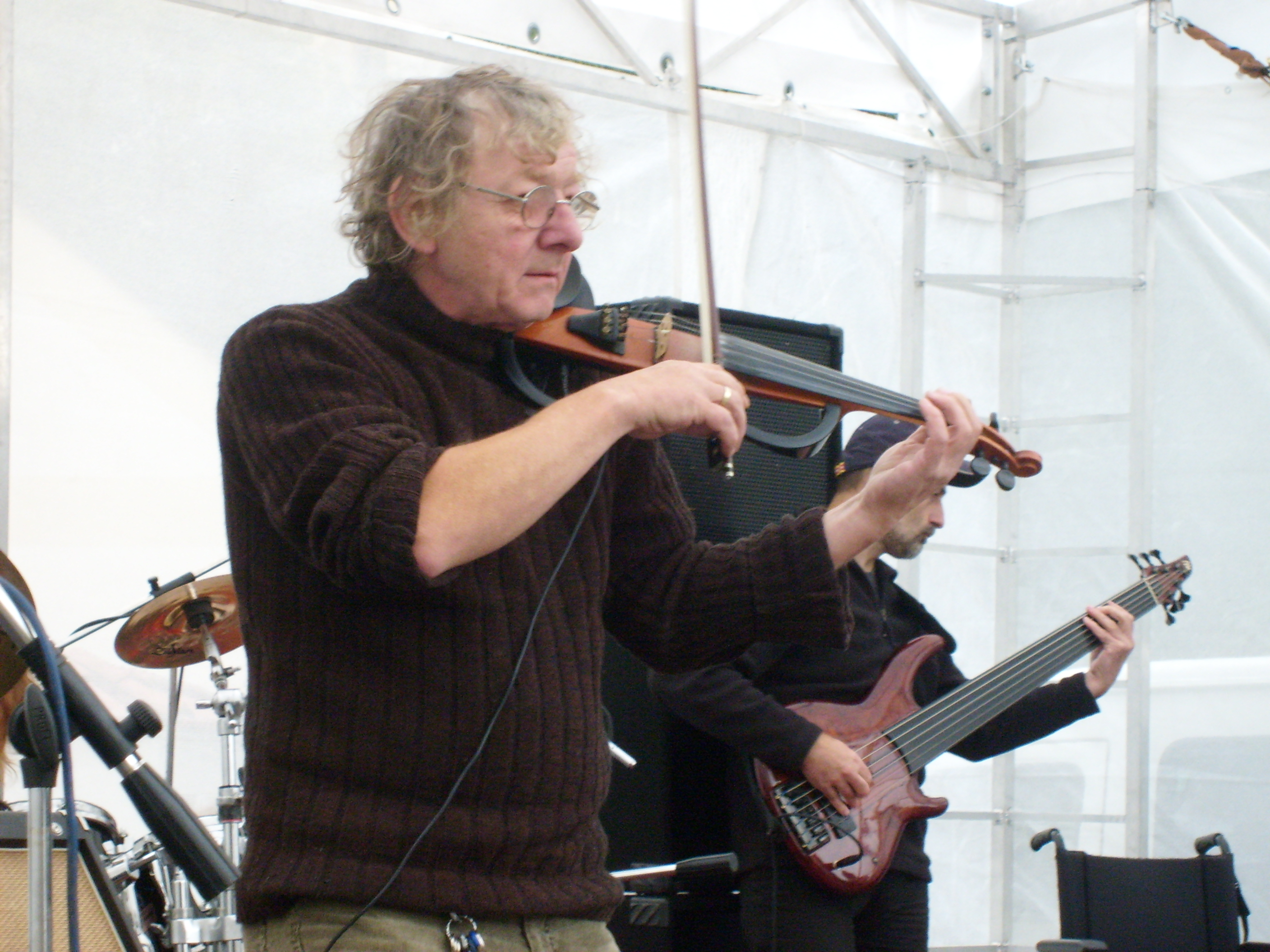 Vladimír Mišík a Etc..., Chrudim